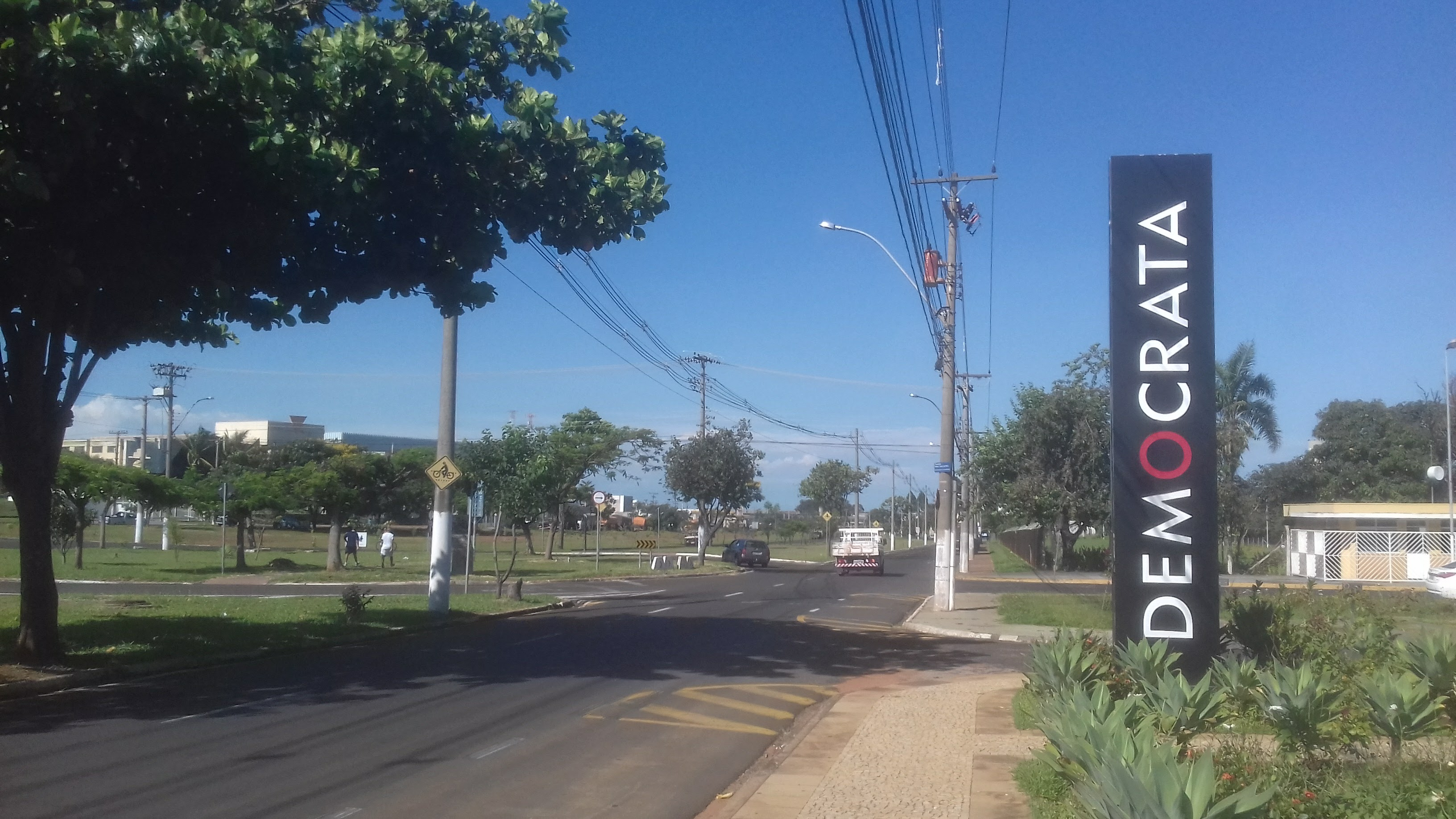 Distrito Industrial, Franca (SP), Brazil